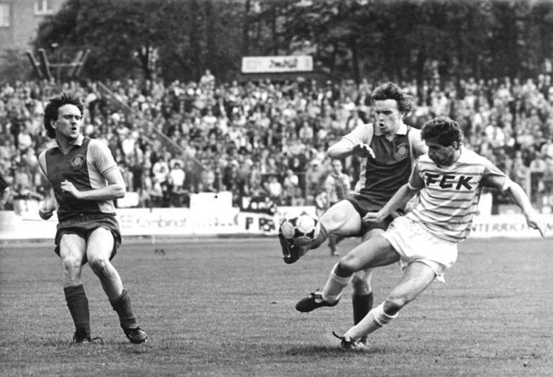 ADN-ZB-Thieme -19.5.87-kb- Karl-Marx-Stadt: FDGB-Pokal- Halbfinale- FCK - 1. FC Lok Leipzig 1:3 (0:2)- Cup-Verteidiger 1. FC Lok Leipzig qualifizierte sich als erste Mannschaft für das Finale um den FDGB-Fußballpokal, das am 13.6. im Berliner Stadion der Weltjugend stattfindet. Spielszene mit den Leipzigern Olaf Marschall (l.) und Heiko Scholz (M.) sowie Matthias Birner (FCK). Scholz und Marschall hatten die Leipziger Tore in der 24. und 54. Minute erzielt.